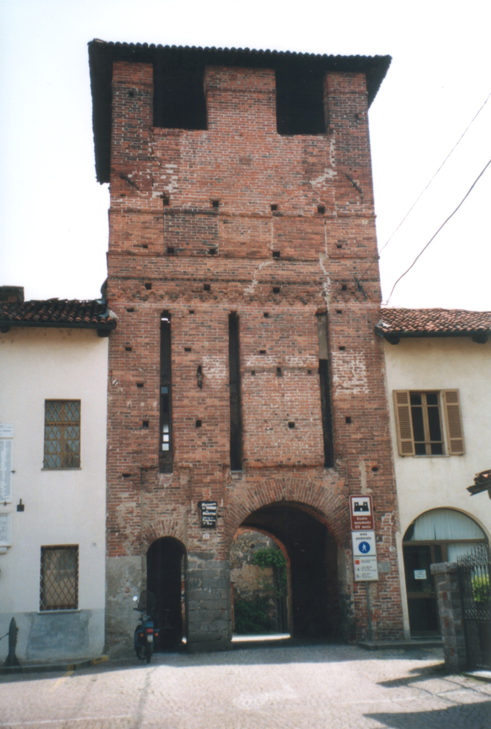 Autore giorces. Candelo - Ingresso al Ricetto.